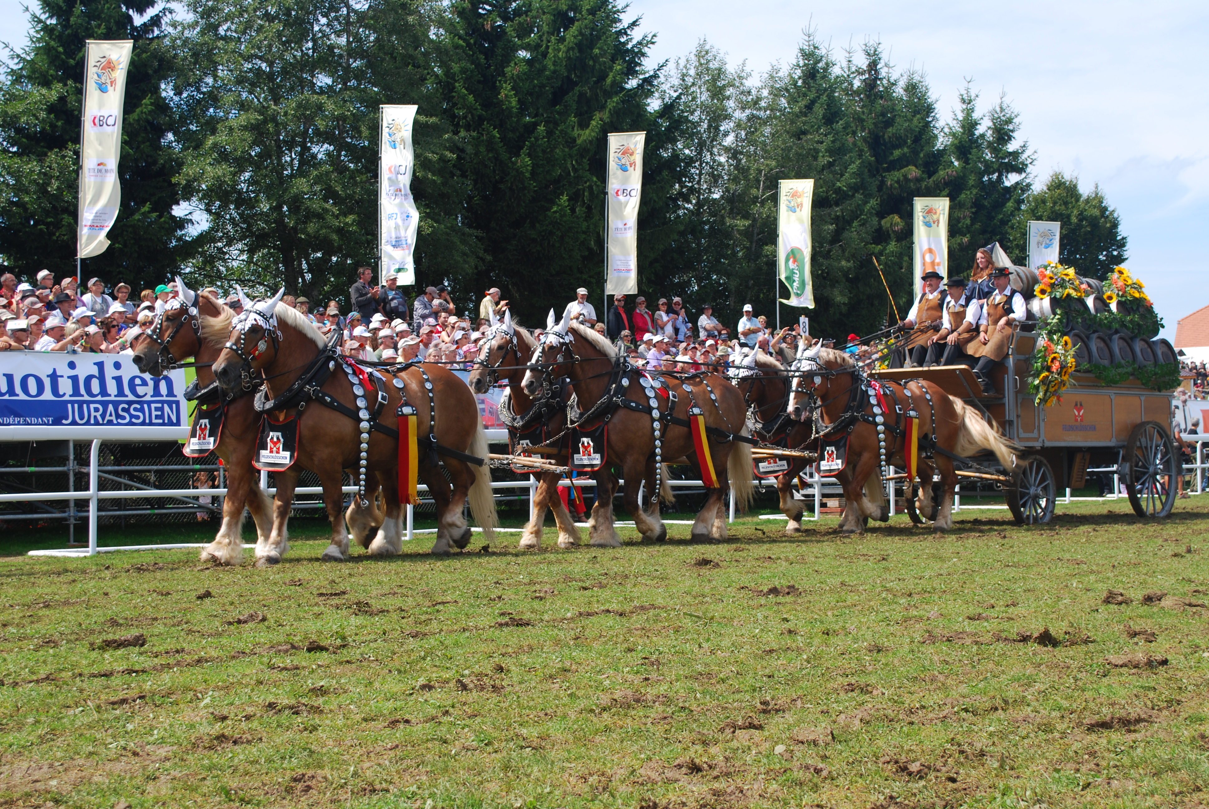 Das Pferdegespann der Brauerei Feldschlösschen, wird zu speziellen Anlässen heute noch eingesetzt. Hier am Umzug in Saignelégier